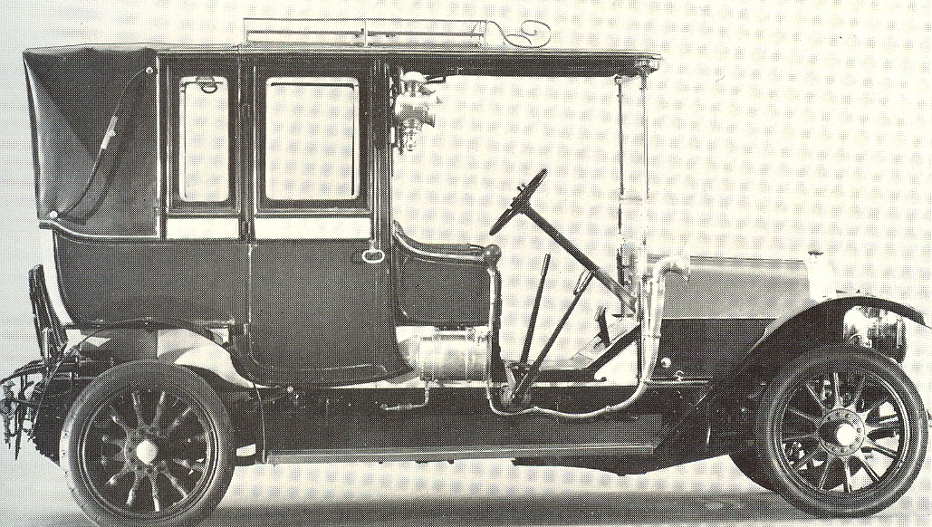 Fiat Tipo 4 (1910)